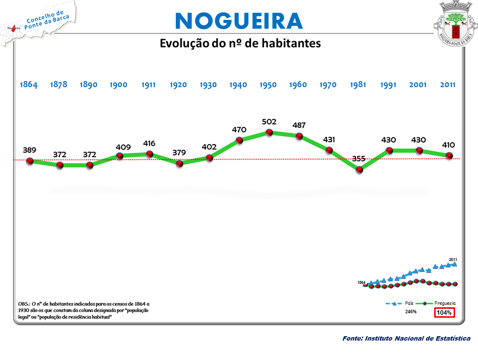 Censos 1864/2011